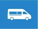 Indice de ligne du transport à la demande de la Semitan.